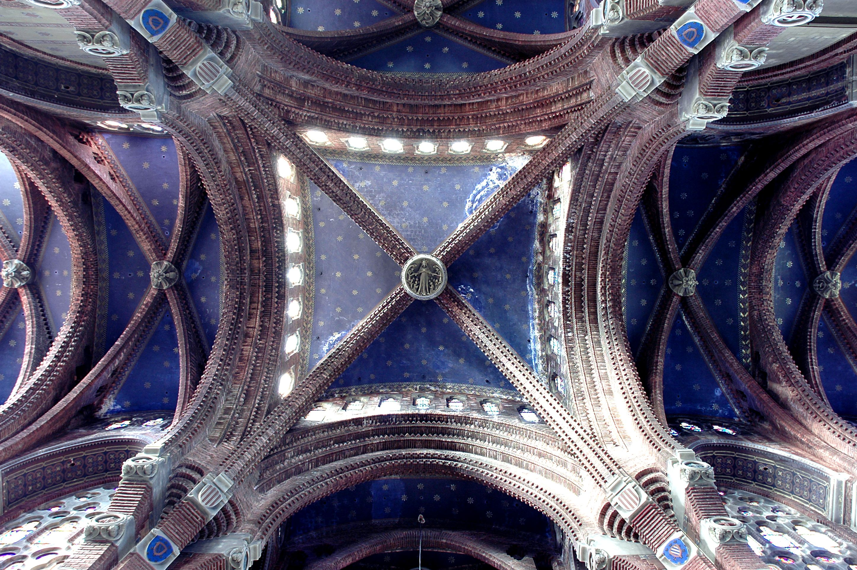 Santa Maria de Valldonzella - Arcs del creuer